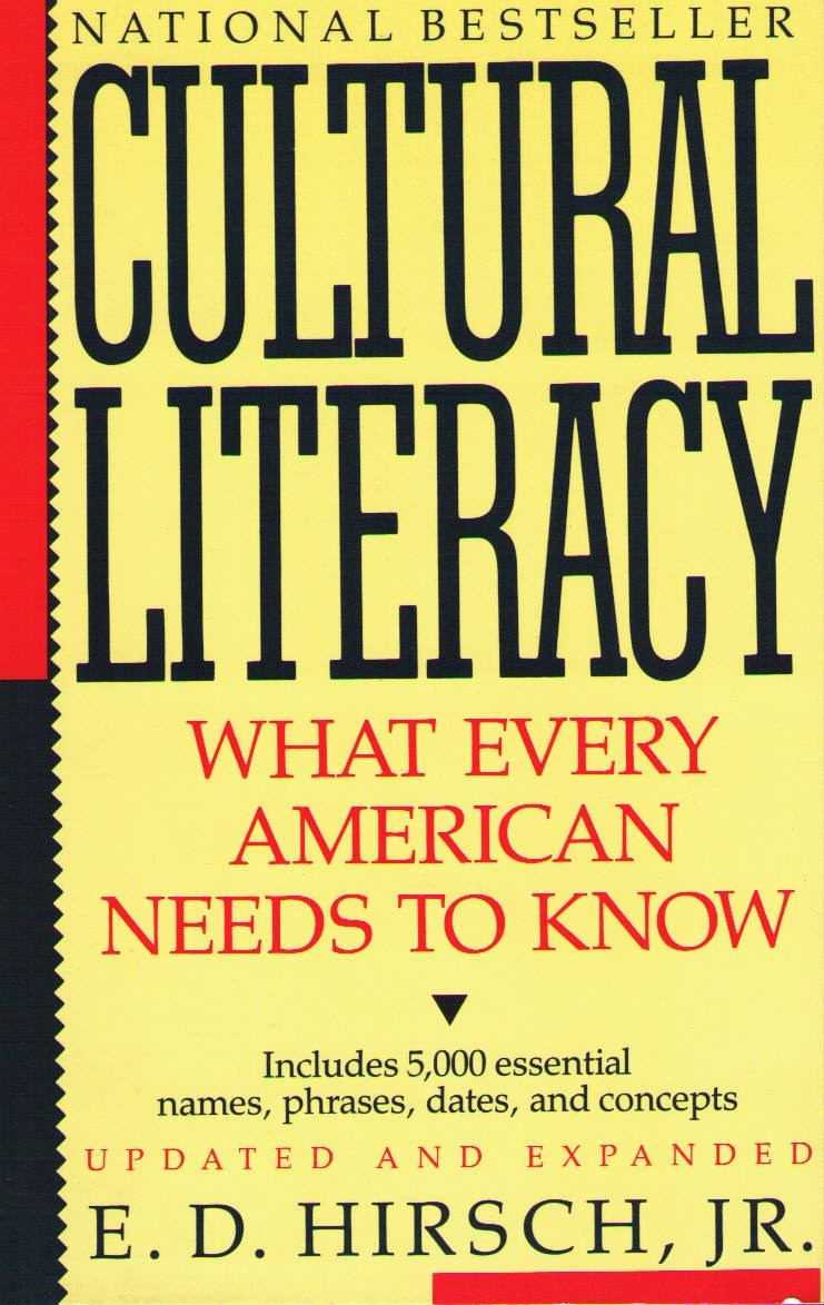 Eric Hirsch: Cultural Literacy: What Every American Needs to Know